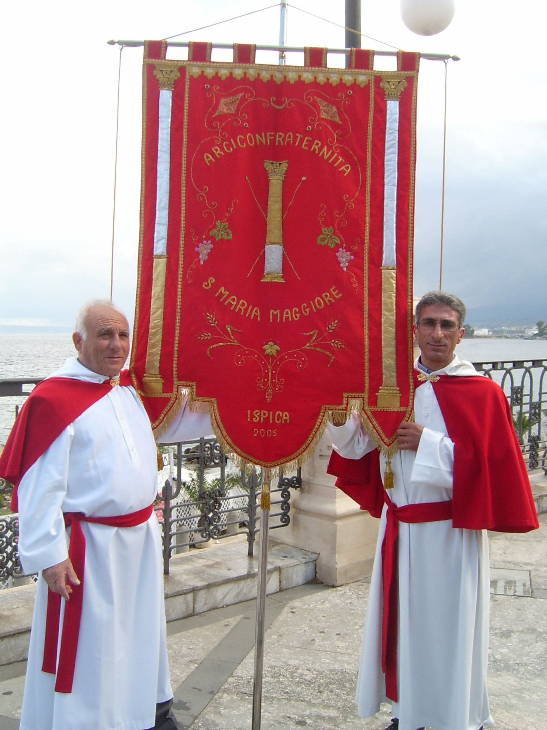 Labaro dell'Arciconfraternita